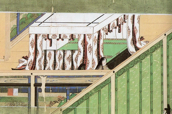 『春日権現験記絵』に描かれた「帳台」